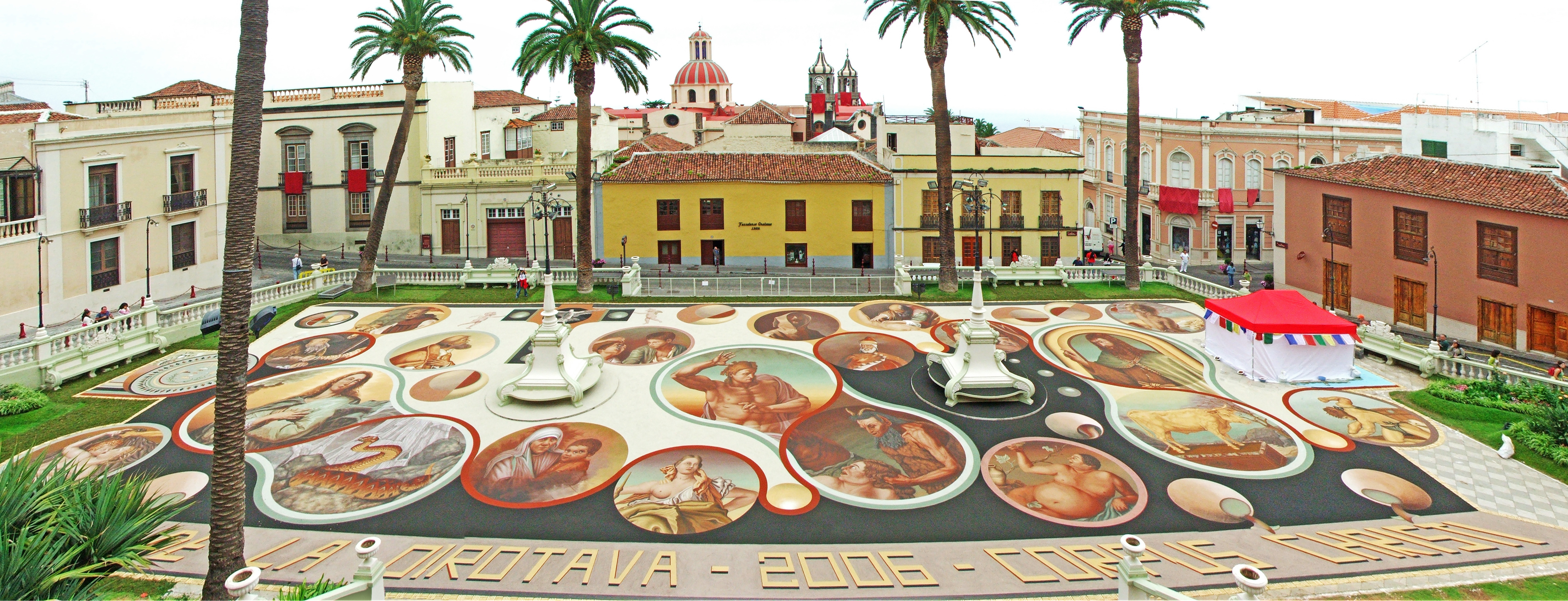 Aus Sand gestreuter "Teppich" (Alfombra) auf dem Rathausplatz in La Orotava. Diese Teppiche werden seit dem Jahr 1912 zu Fronleichnam gestreut. Die Tradition der Blumenteppiche in den Straßen geht auf das Jahr 1847 zurück.